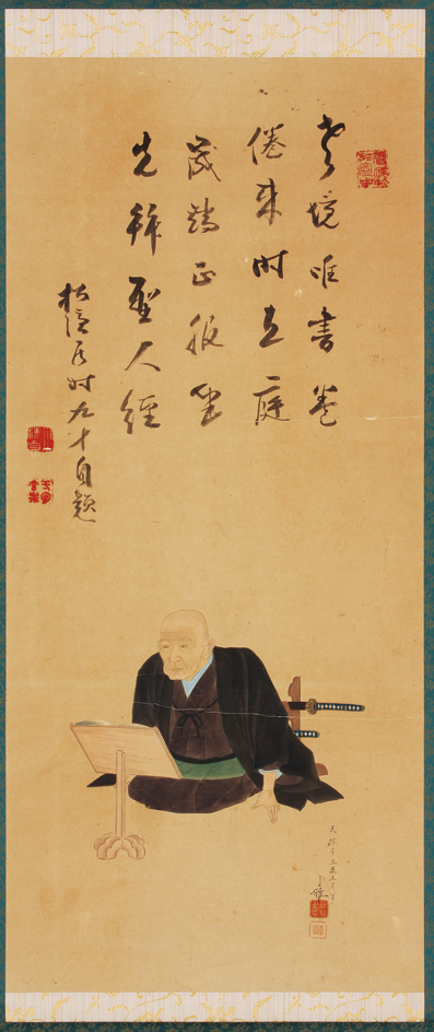 西山玄道画像